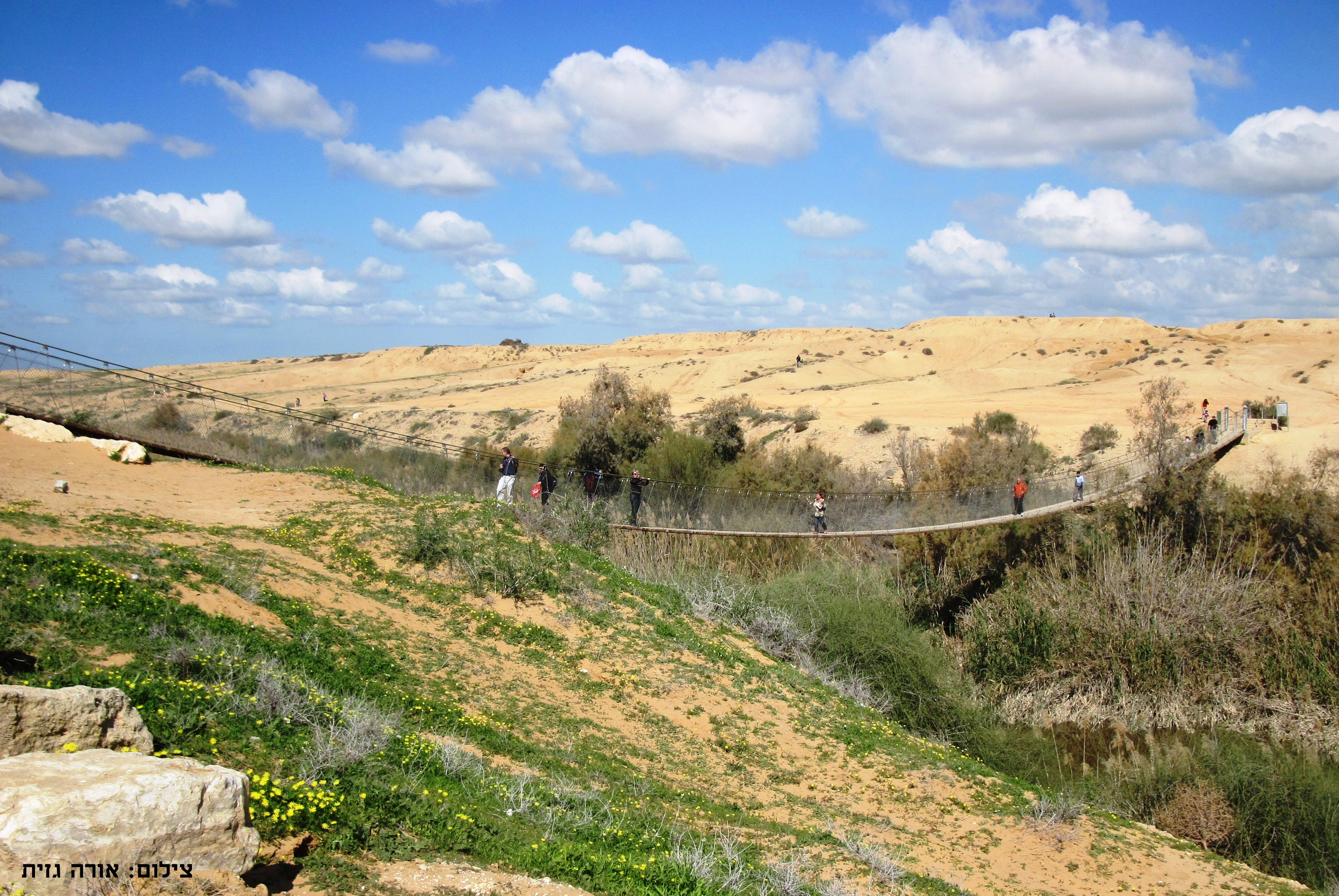 גשר החבלים מעל נחל הבשור צילום: אורה גזית